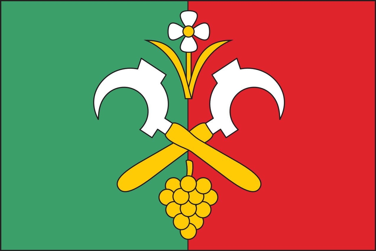 Vlajka obce Moravské Bránice